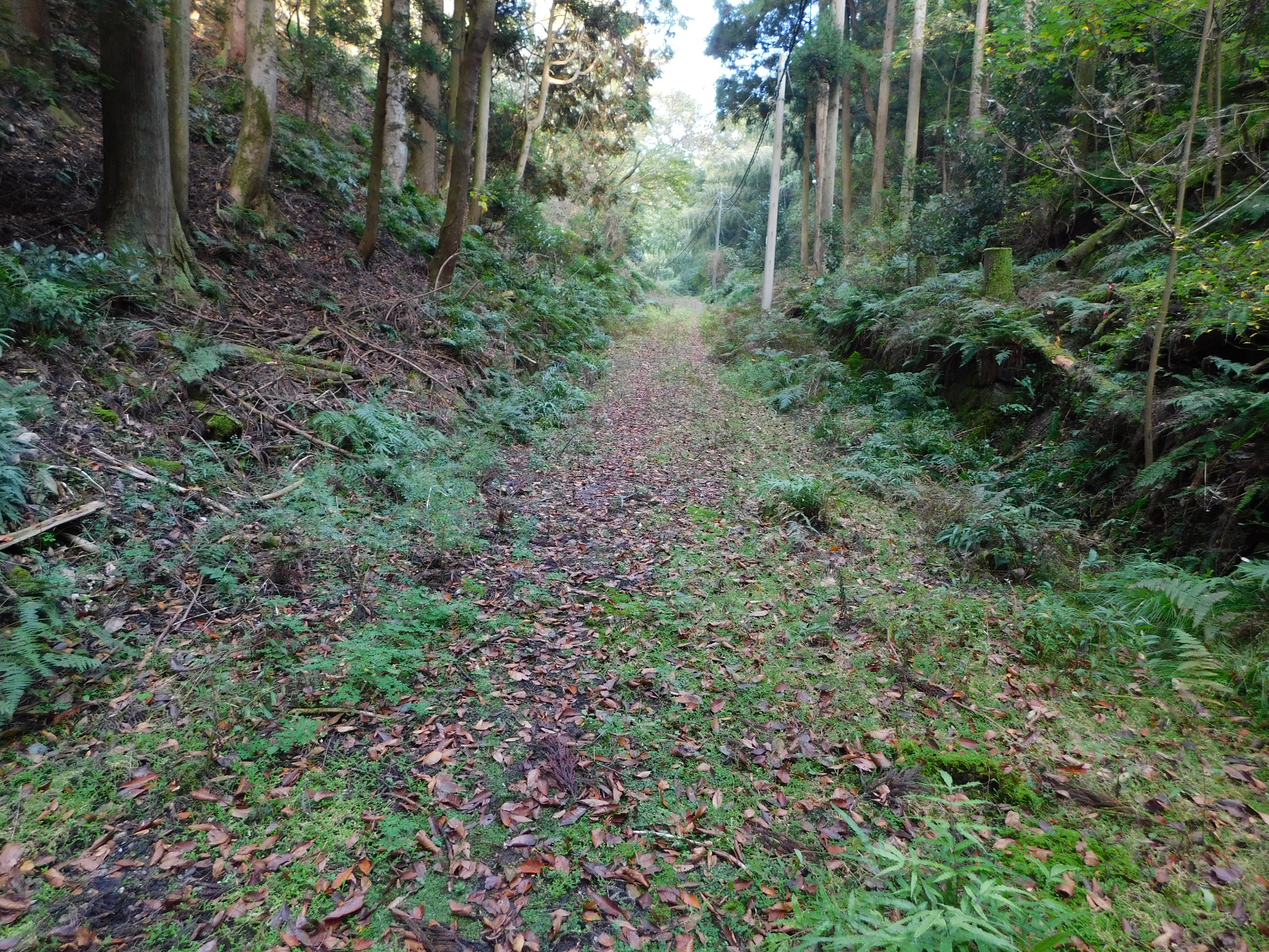 旧丹後街道の吉坂峠、京都側から福井方向を望む。